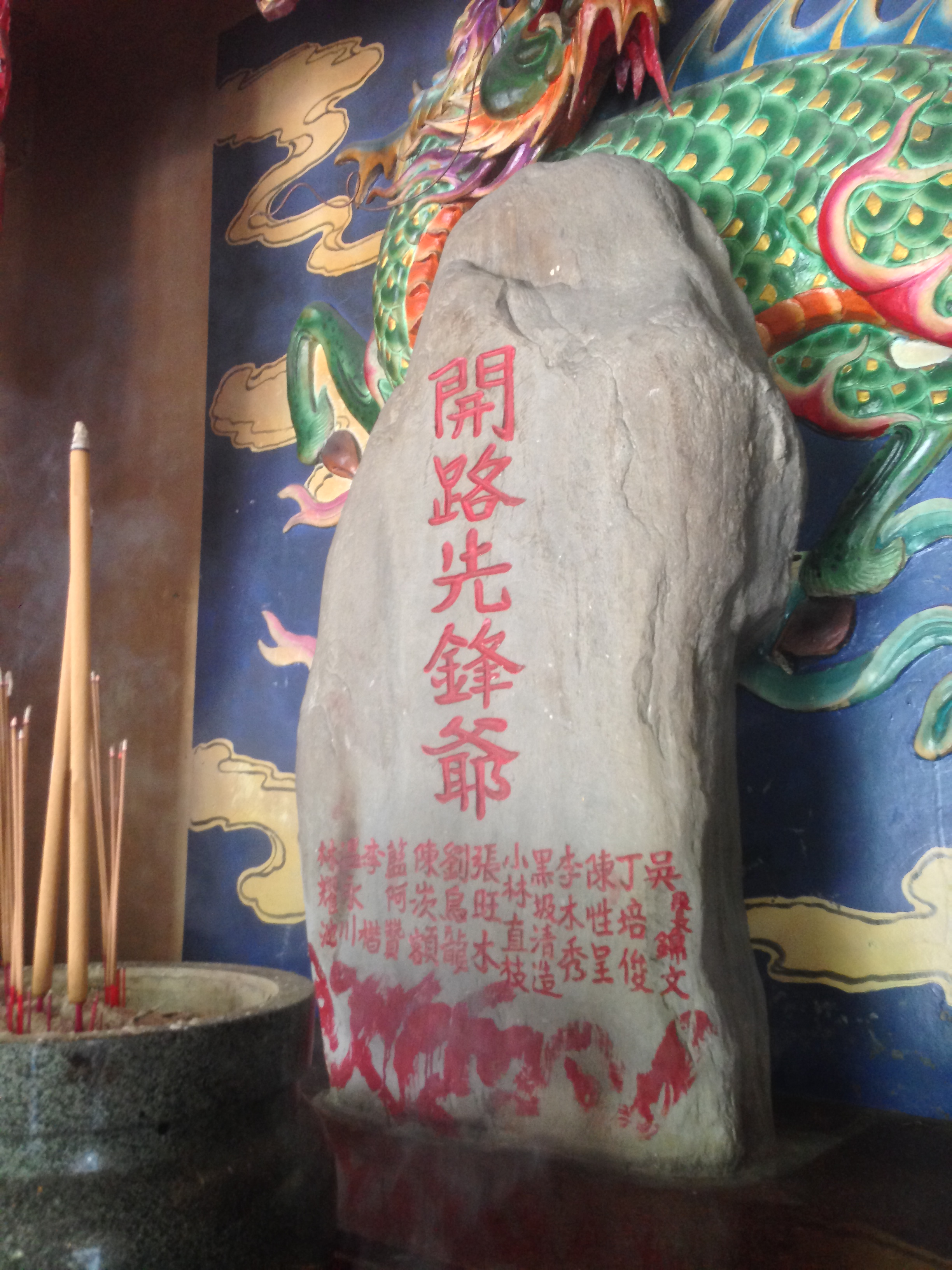 中文（台灣）: 石牌公(遭難碑)